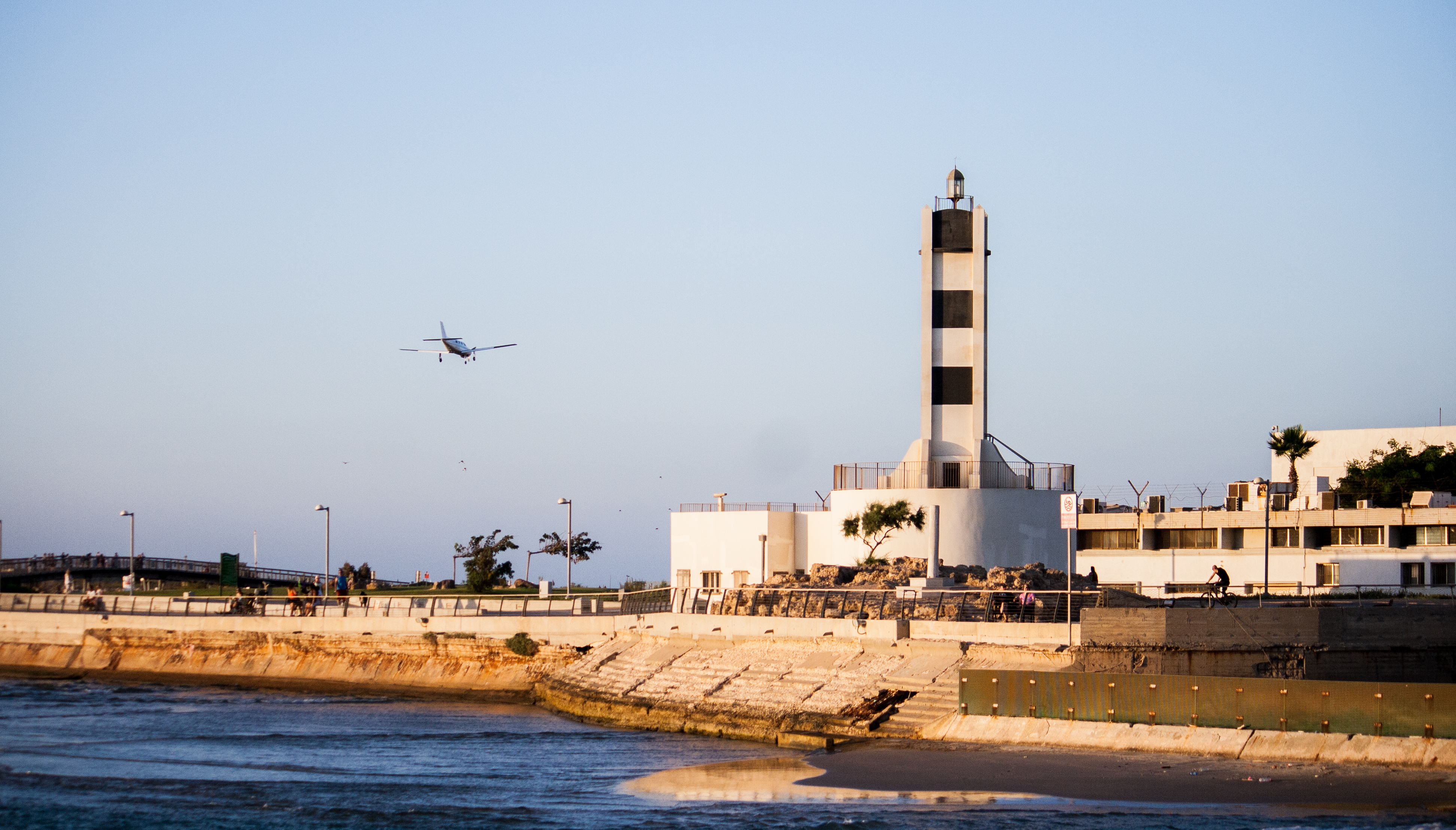 נמל תל אביב, הנמל העברי הראשון ב"עיר העברית הראשונה", ממוקם בצפון מערב העיר תל אביב. הנמל נפתח רשמית ב-23 בפברואר 1938, האוניה האחרונה הגיעה לנמל תל אביב ביום 25 באוקטובר 1965 עבודות הפריקה והטעינה הופסקו ב-3 בנובמבר 1965, בעקבות פתיחתו של נמל אשדוד. אזור המעגן הישן משמש כיום כמרכז בילויים.